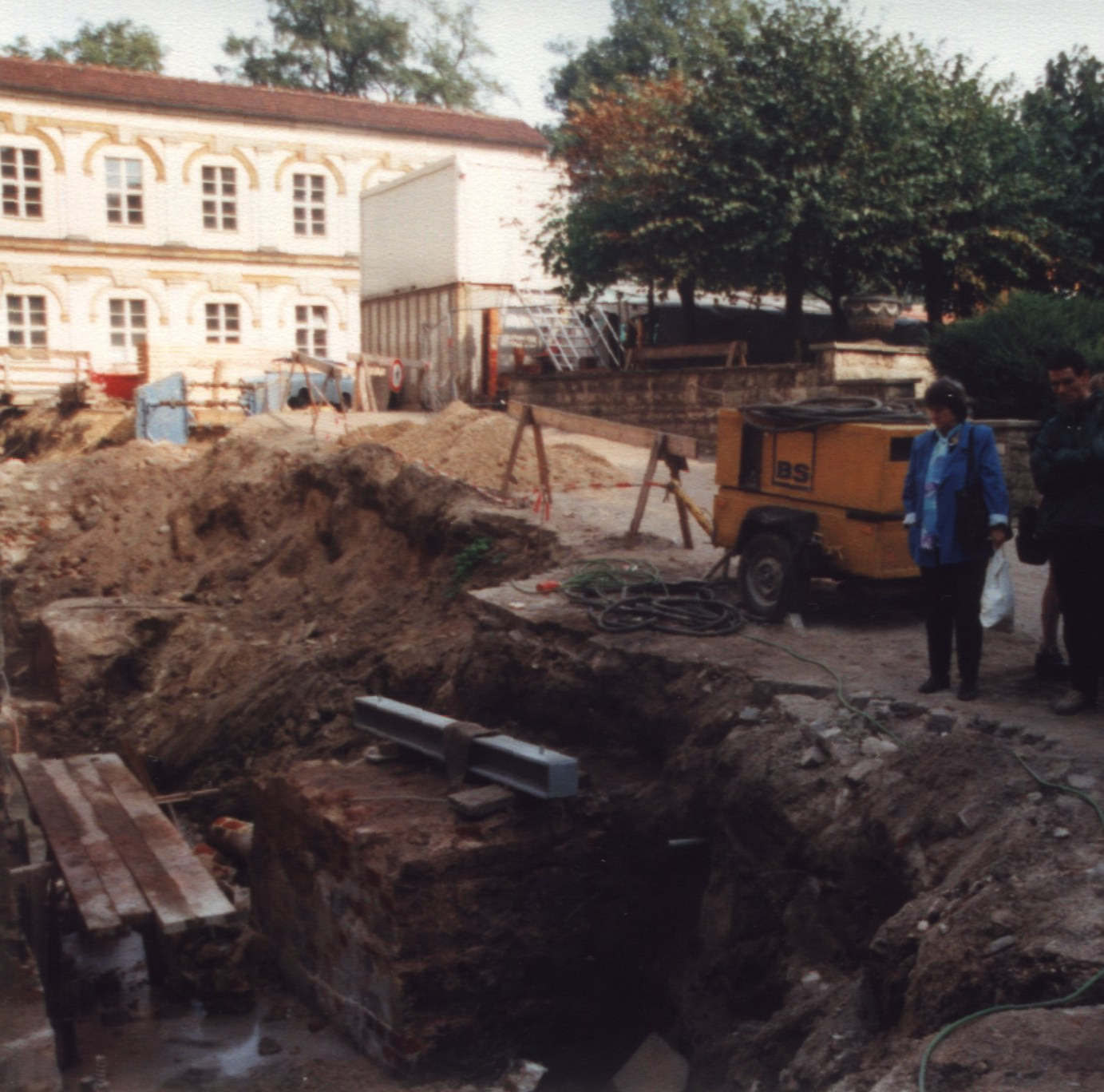 Grabung 1998 auf der Schlossinsel Köpenick vor dem Schloss Köpenick